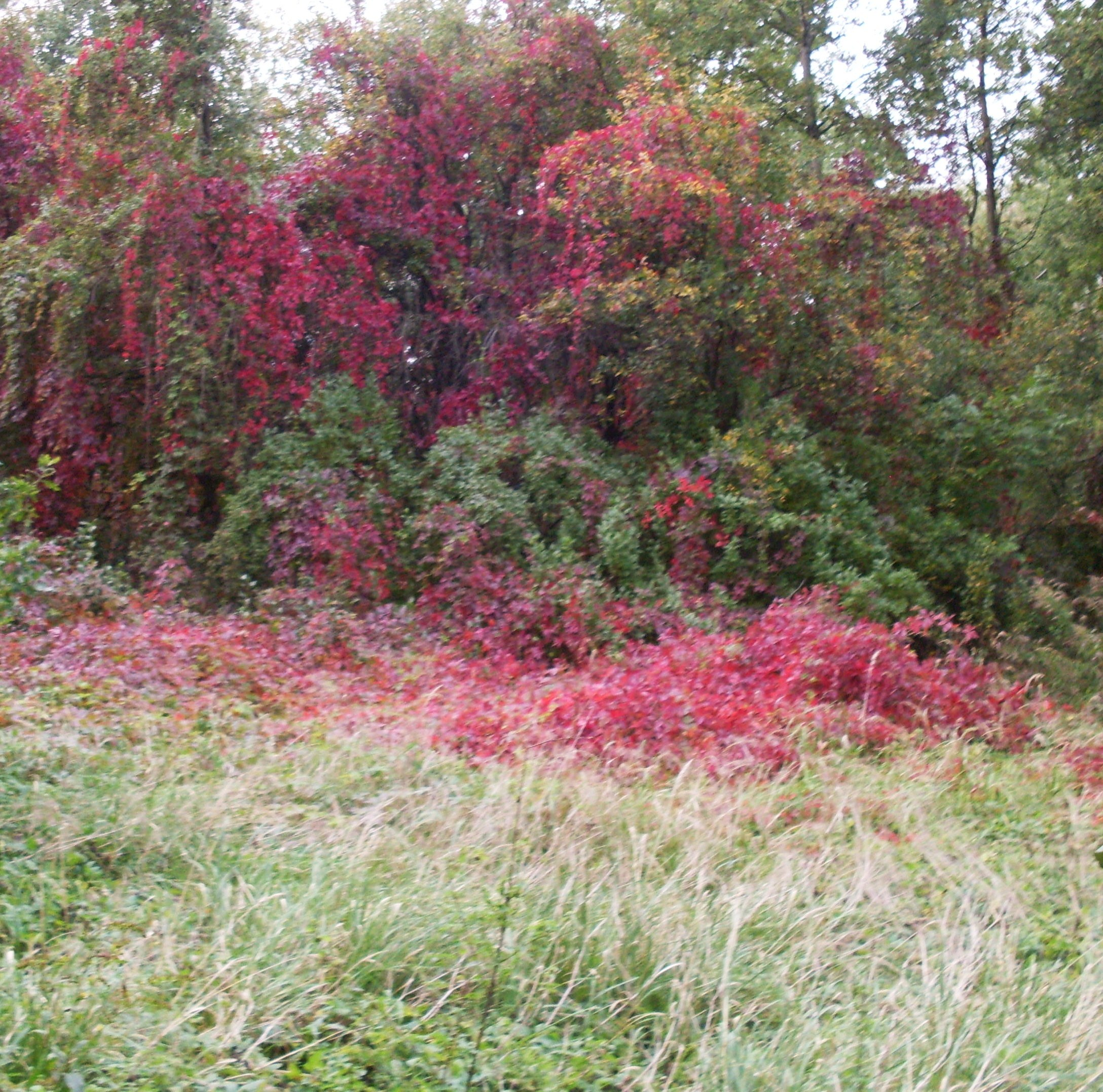 D. KWK Danuta.Tenczynek